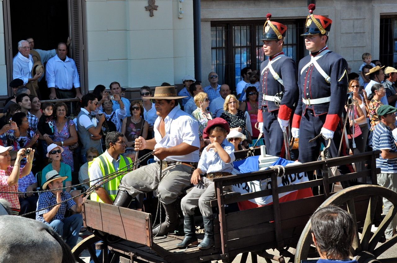 Fiesta de la patria Gaucha en Tacuarembó, Uruguay. Año 2013.